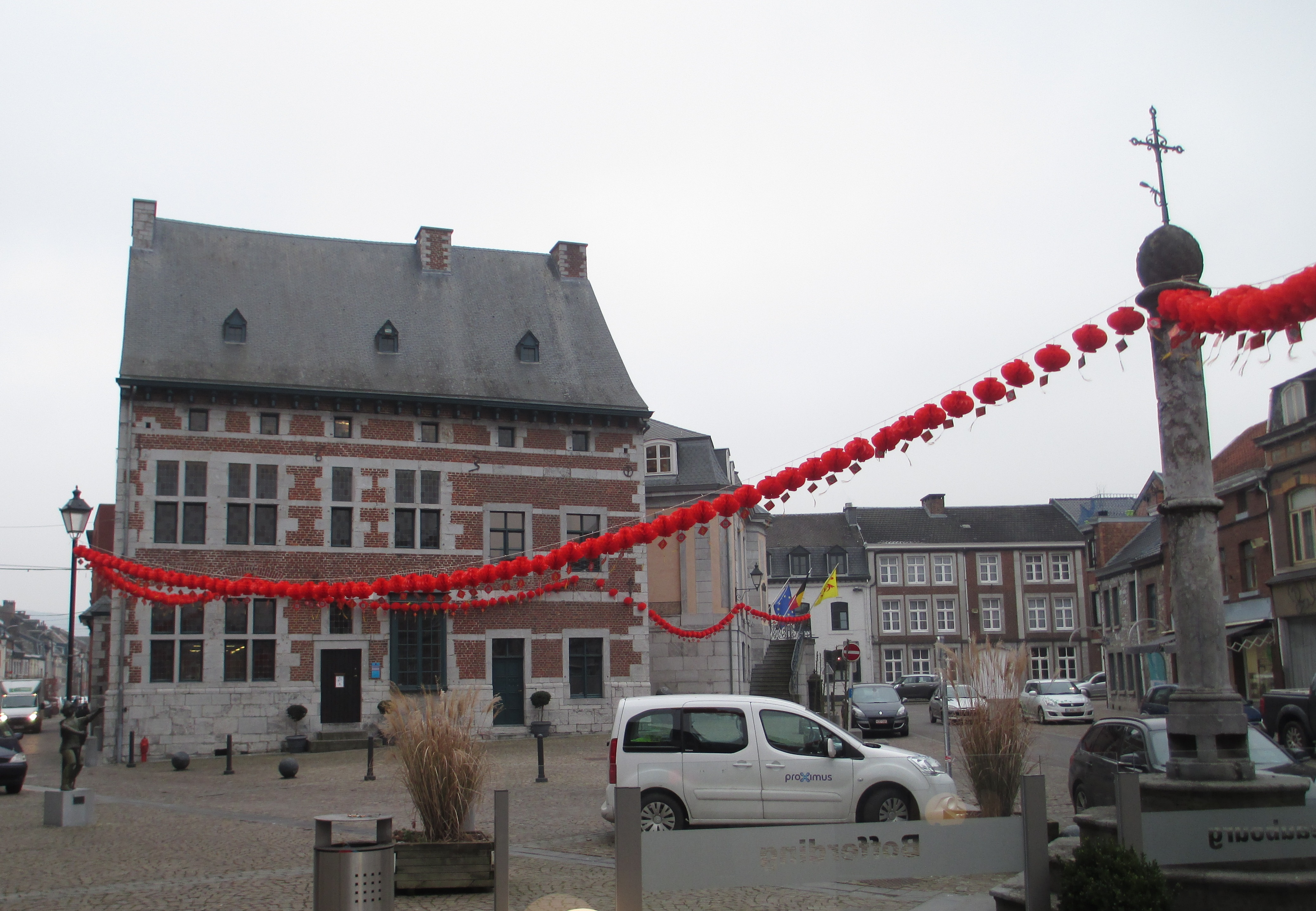 Lors de la Biennale d'Art Theux / Chine en janvier 2015, la population theutoise était invitée à décorer maisons, fenêtres, jardins, rues, parcs et lieux publics avec des milliers de lanternes offertes par un artiste chinois. Voici l'une des installations artistiques, la Place du Perron, avec de gauche à droite la sculpture "Le Franchimontois du Perron", la Maison communale et l'Hôtel de ville, le Perron.